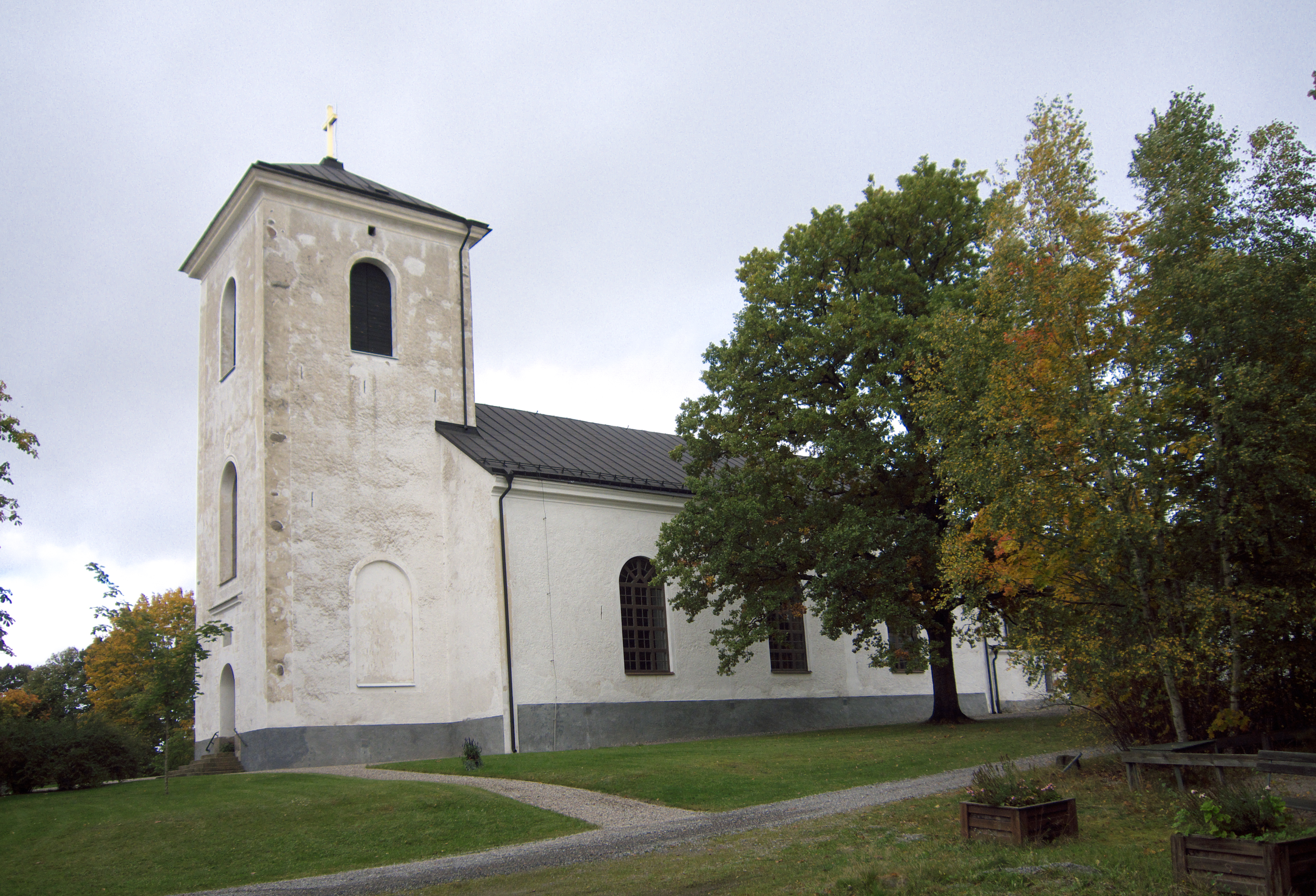 Västra Skedvi kyrka